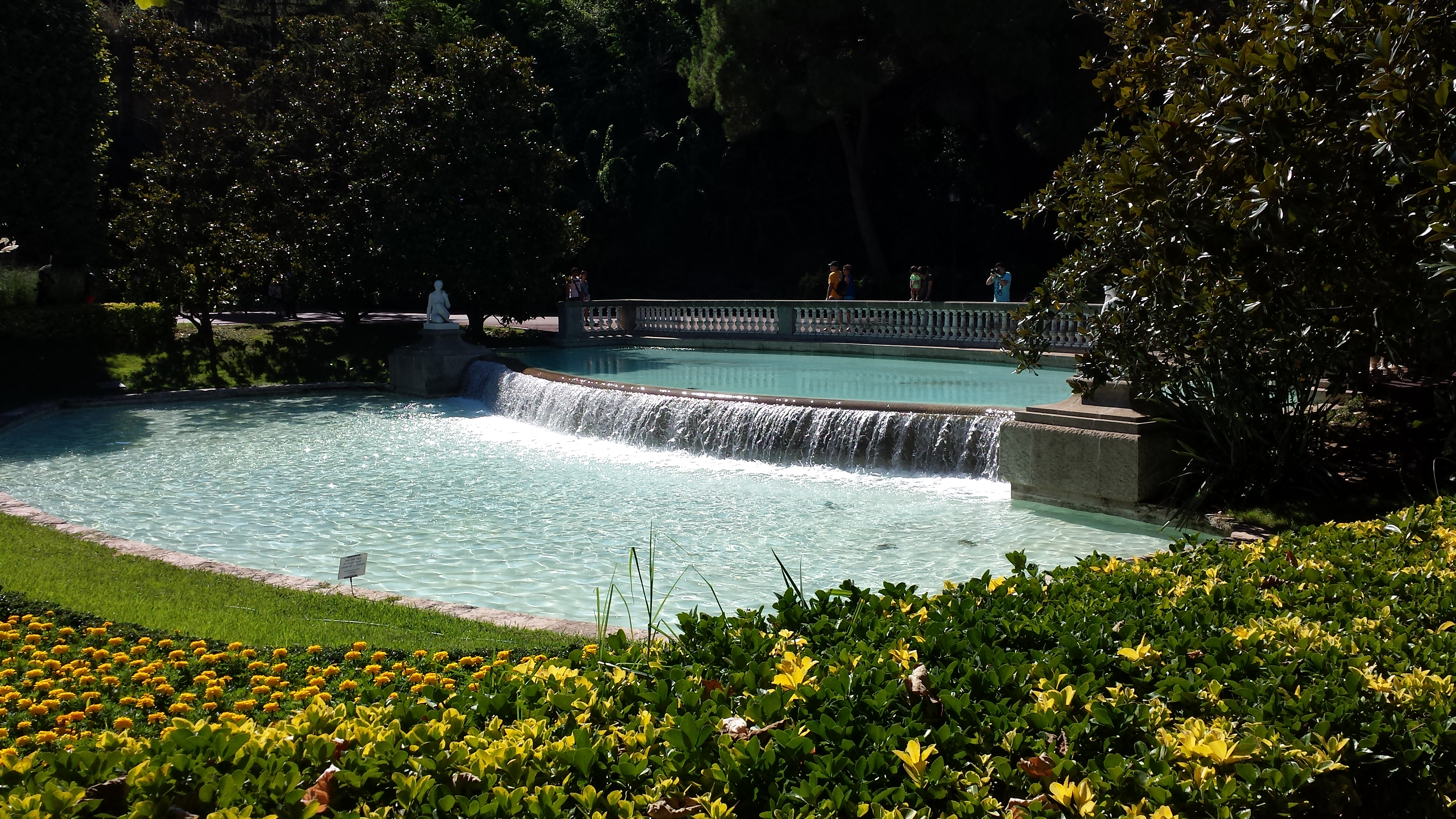 Palauet Albéniz al 2013 durant les festes de La Mercè.